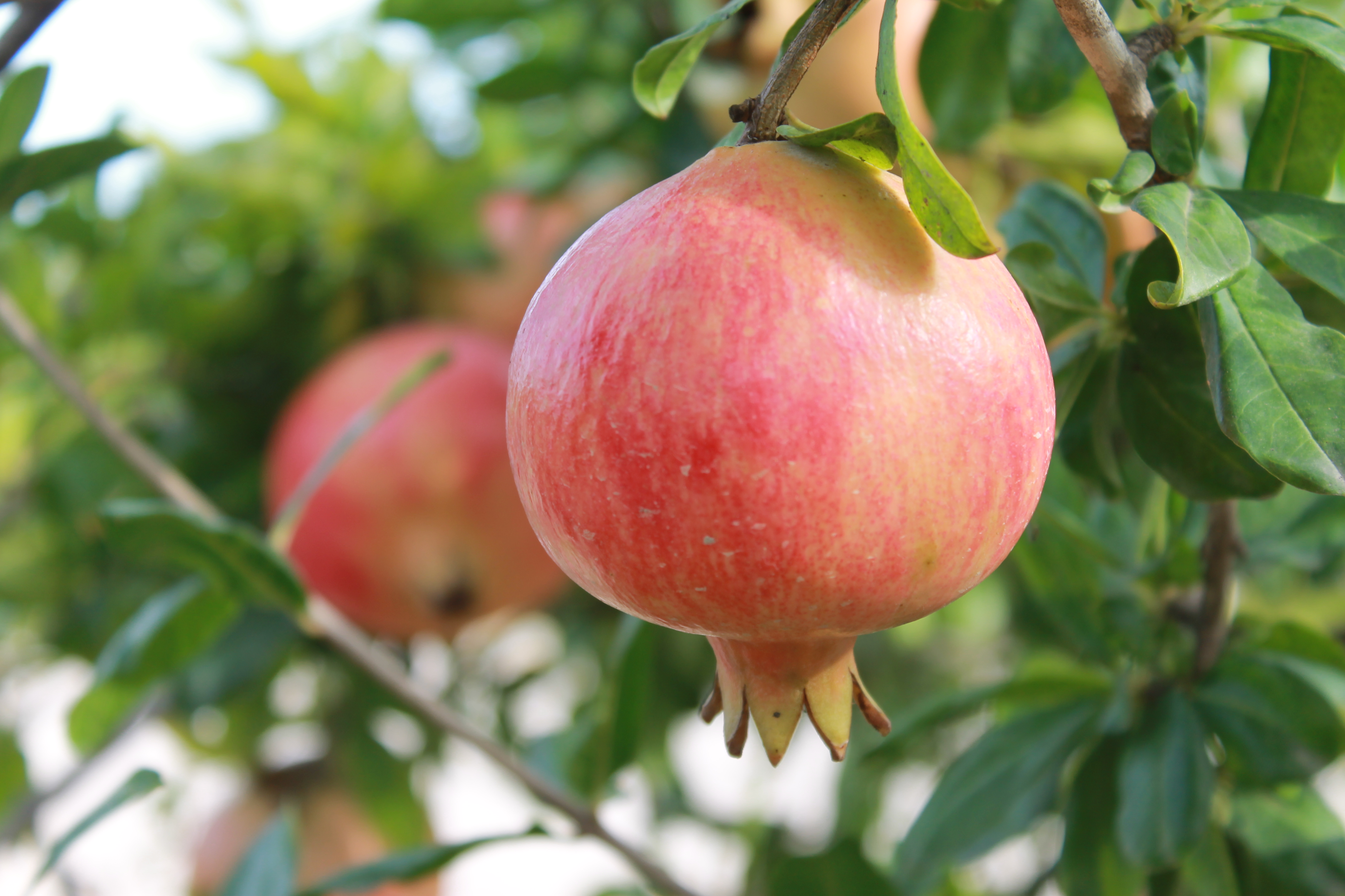 La Granada Mollar de Elche con denominación de Origen Protegida en el árbol.